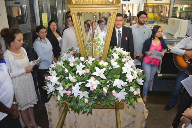 Na manhã desta terça-feira, a imagem peregrina da Virgem de Nazaré deixou a sede do Tribunal de Justiça do Amapá. A imagem segue em peregrinação indo para a Eletronorte, como parte da programação do Círio 2014.